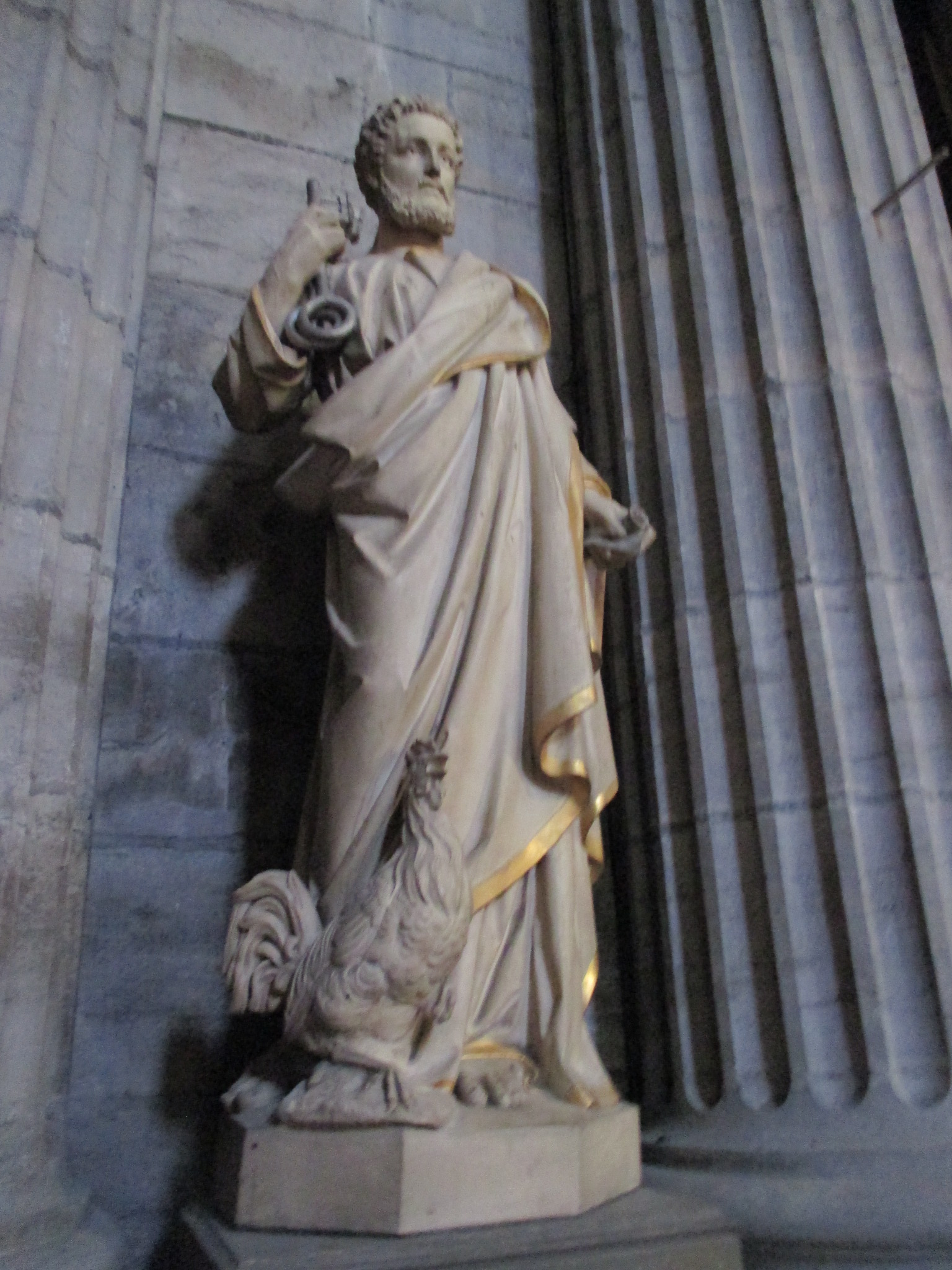 Église Sainte-Madeleine de Besançon